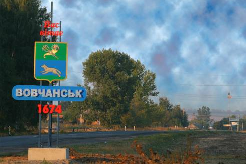 Вас вітає Вовчанськ